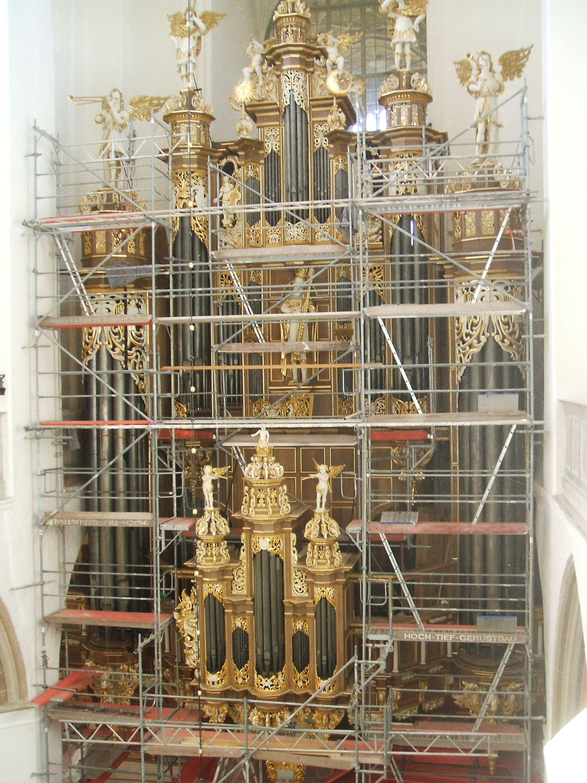 Stellwagen-Orgel Stralsund, Restaurierung 1 (2007-09-10).JPG